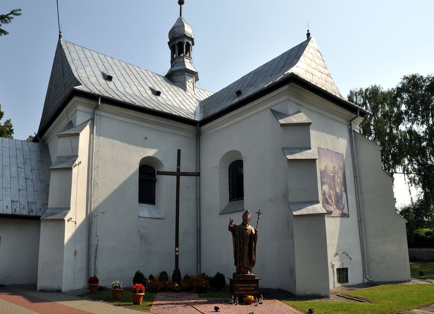 Sobków - dawny zbór kalwiński ufundowany około 1560 roku przez Stanisława Sobka z Sułowa